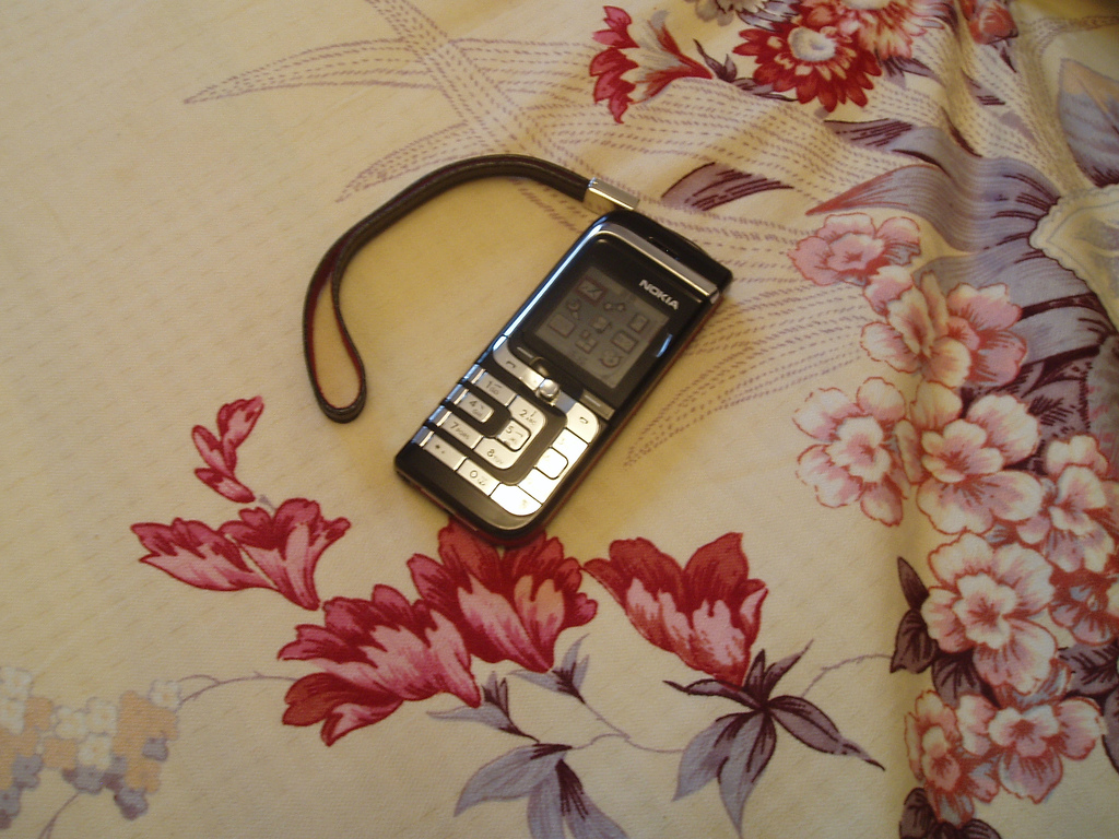 Nokia 7260